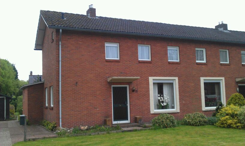 Huizen aan de Julialaan in Schoonebeek naar een ontwerp van architect Arno Nicolai.